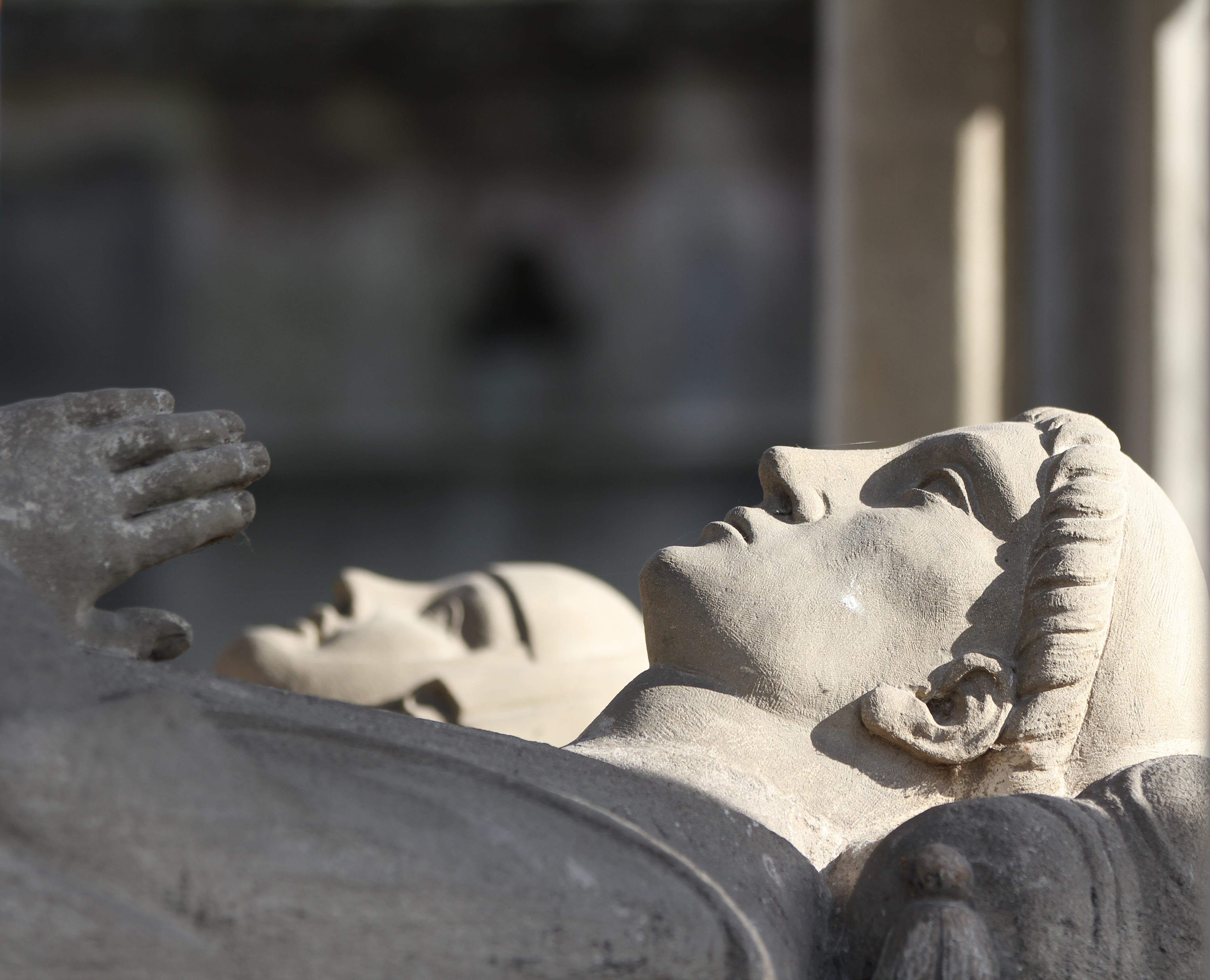 Tombeau de Pierre Abélard (1079-1142) et Héloïse d'Argenteuil (1101–1164) réalisé par Lenoir à partir de fragments de la chapelle de l'abbaye du Paraclet et du tombeau du prieuré Saint-Marcel. La chapelle sépulcrale est ornée de colonnes, d'ogives et d'un clocher percé à jour. Sur le catafalque reposent deux gisants représentant Héloïse et Abélard. détail gisant